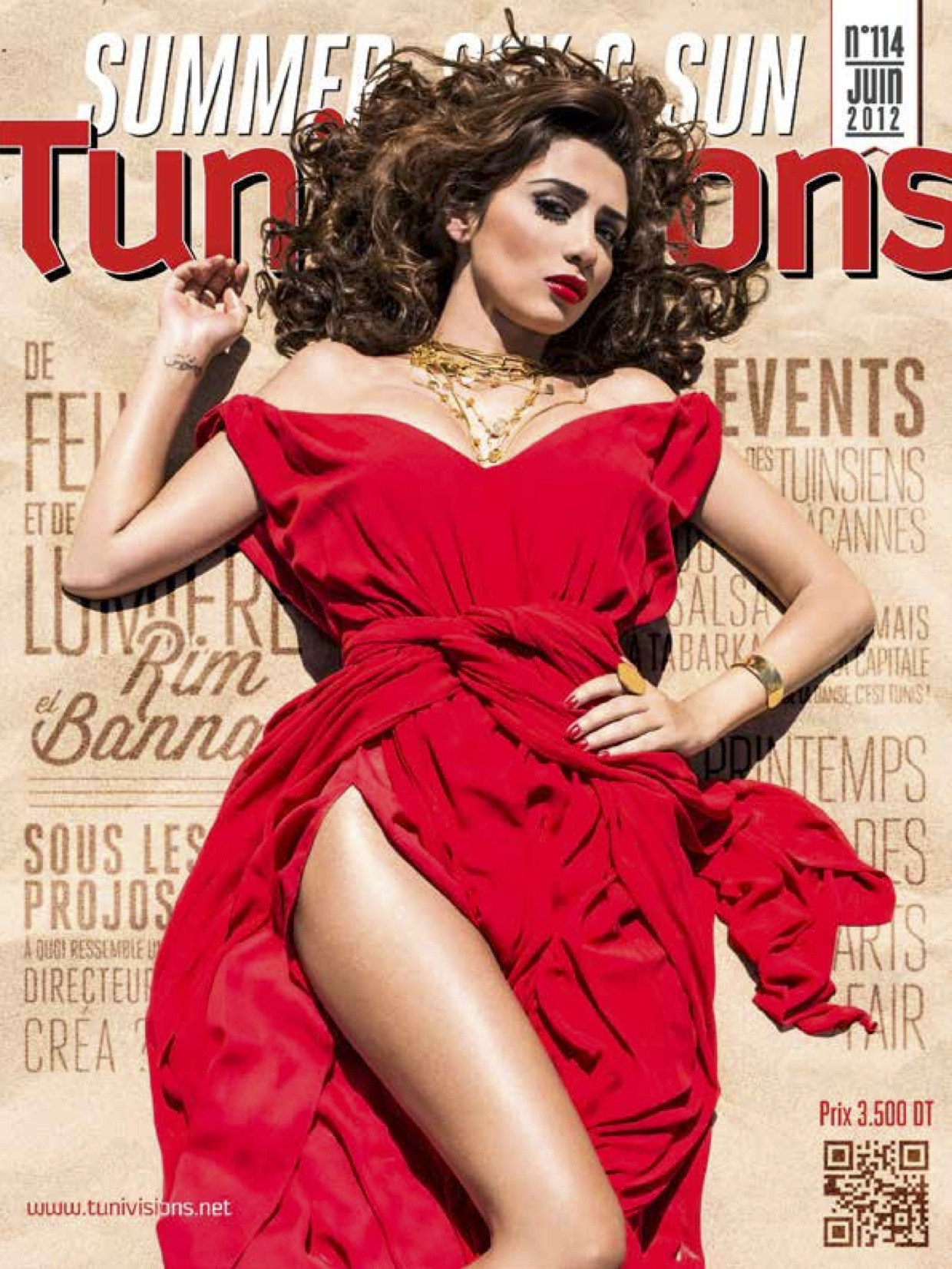 Couverture du numéro 114 du magazine tunisien Tunivisions.